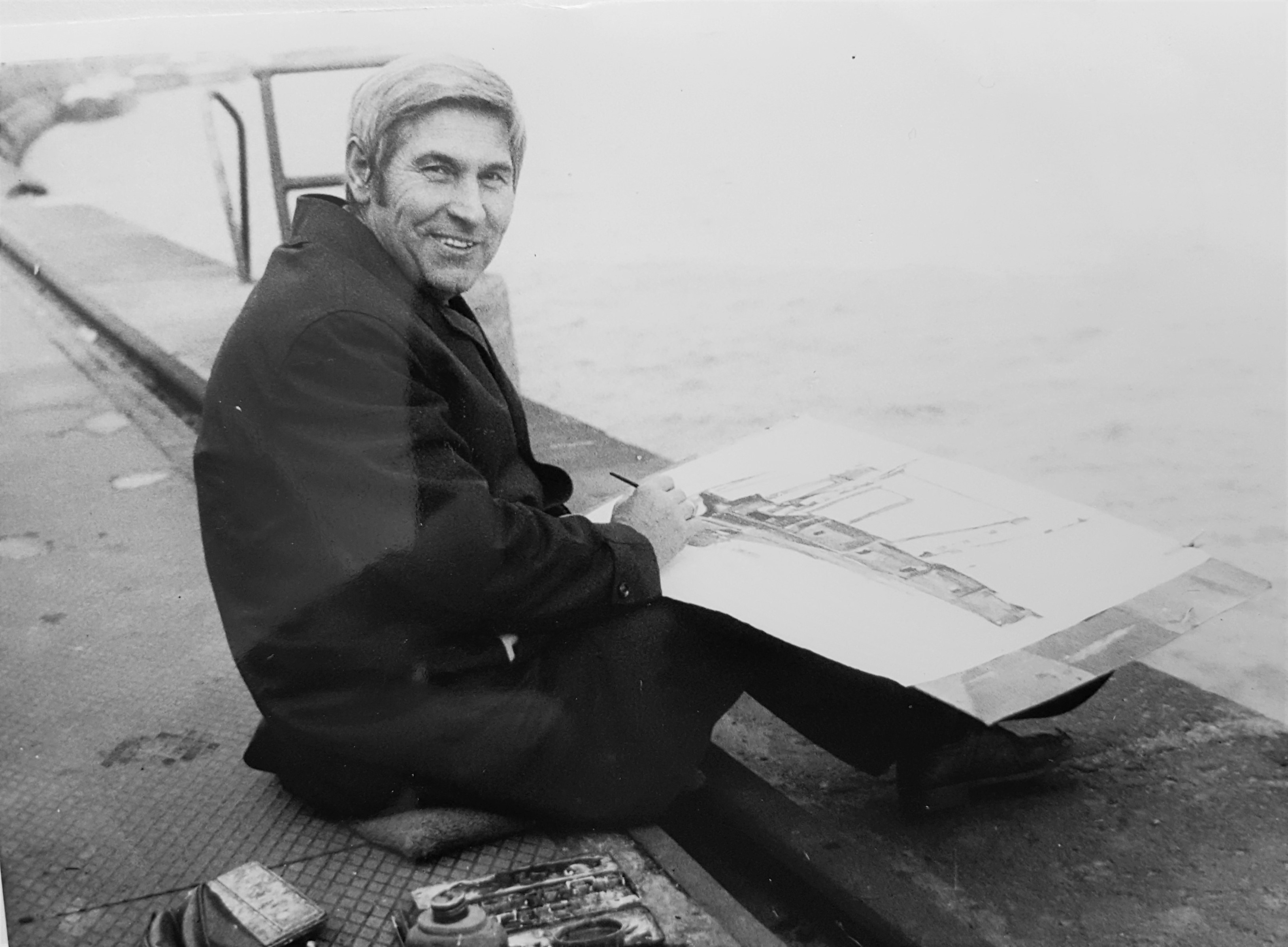 •Löffler: Quelle I. Löffler, frei für alle, Beschreibung: Paul Löffer beim Arbeiten im Hafen Mannheim, ca. 1975